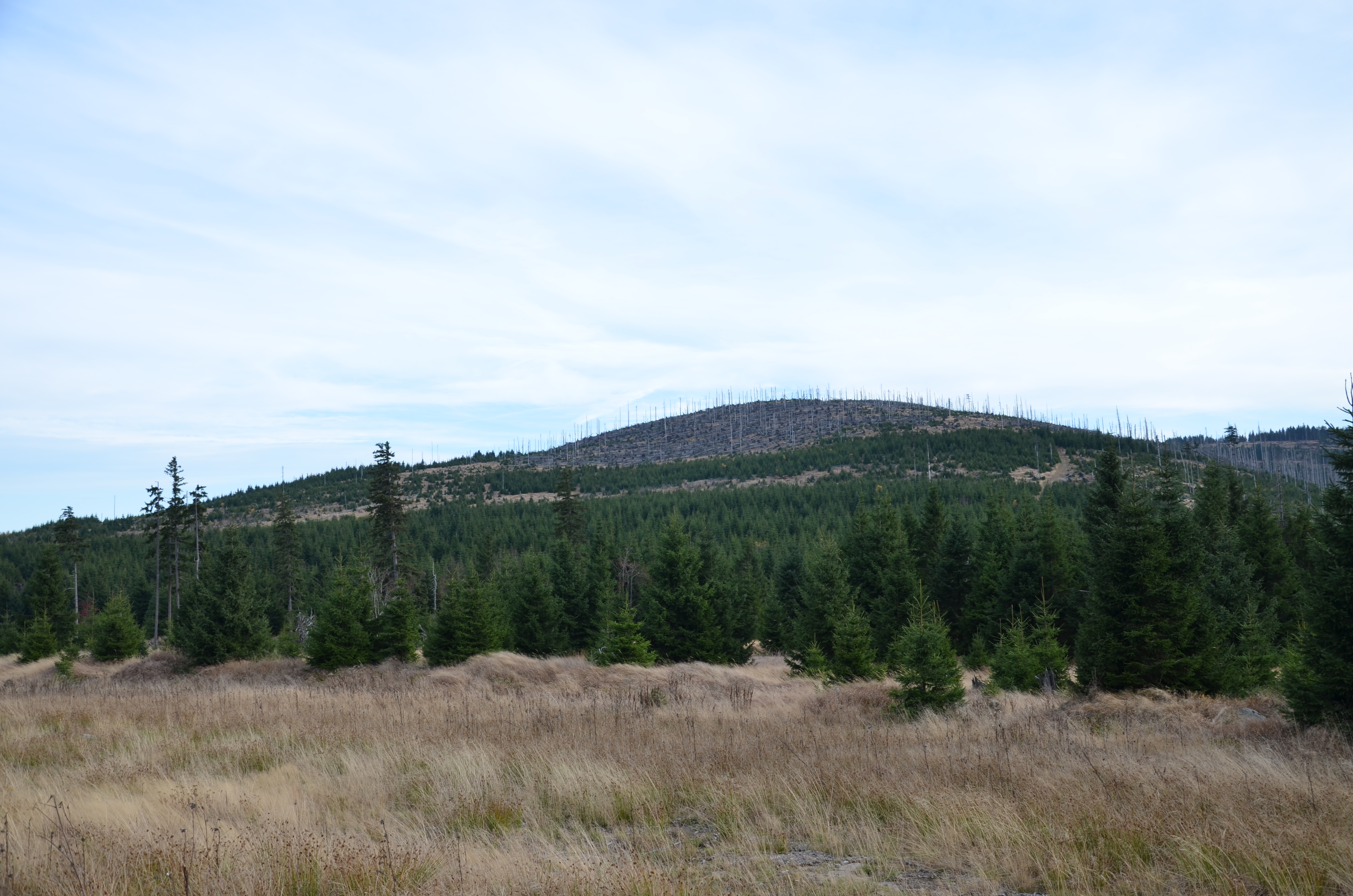 Plesná (Lackenberg, 1337 m) na Šumavě a v Bavorském lese, pohled ze SZ